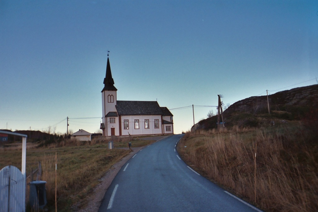 Norbotn kyrkje på Hitra